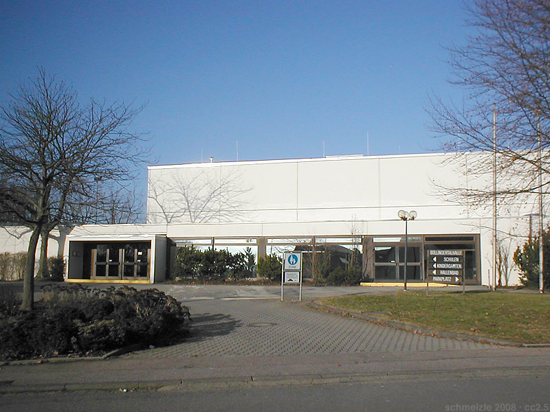 Böllingertalhalle, Bibersteige 15, Heilbronn-Biberach